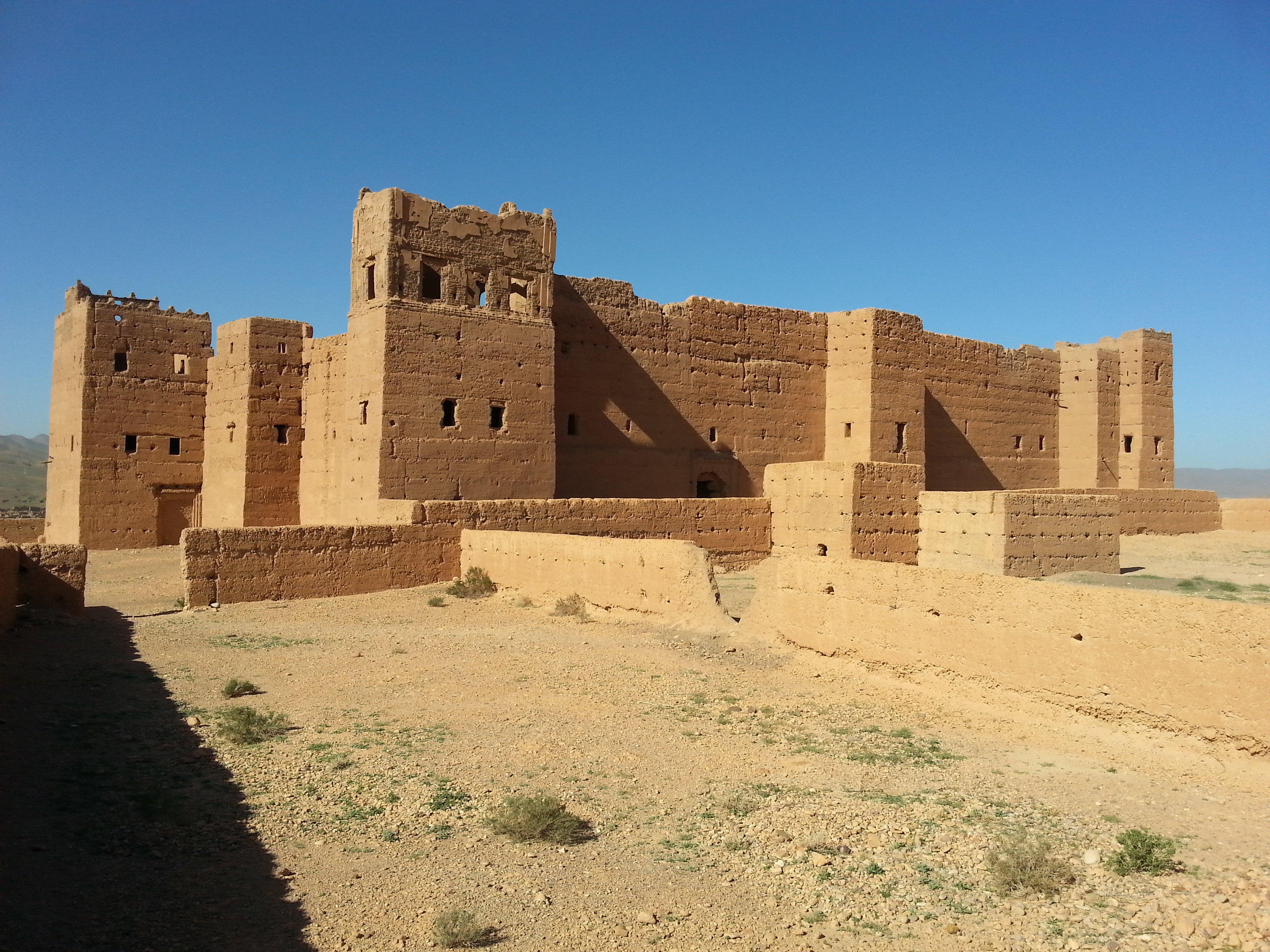 Casbah de Tawrirte.